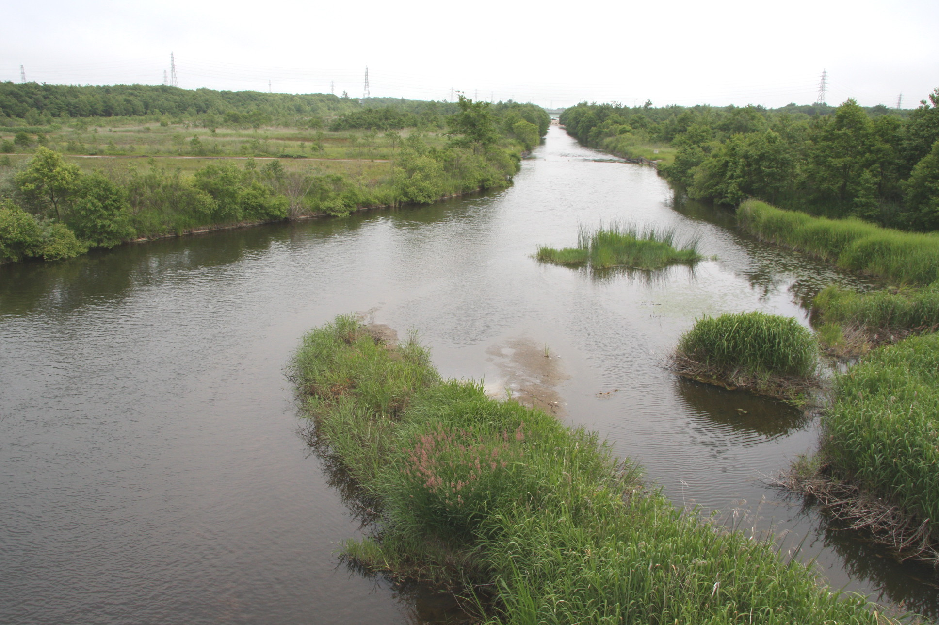 勇払川（苫小牧市沼ノ端） 沼の端橋より下流を望む